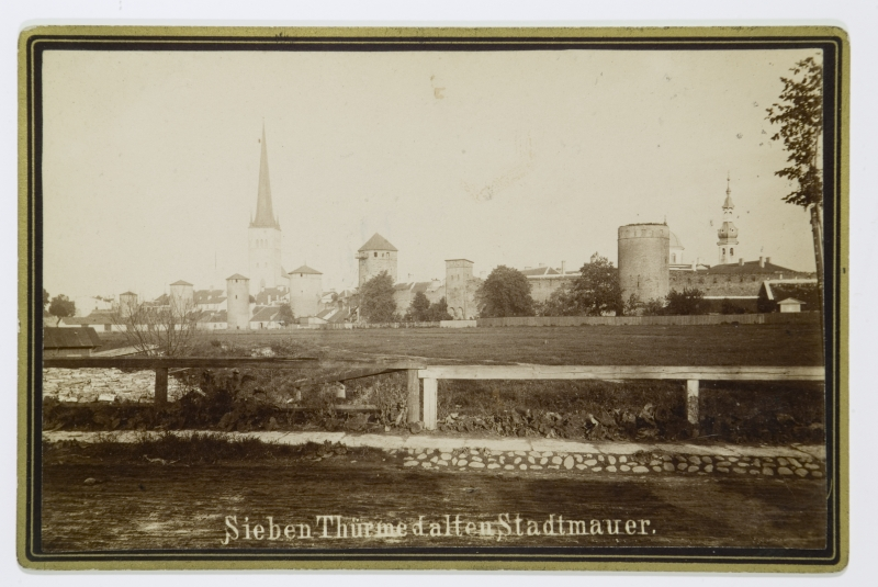 Tornide väljak